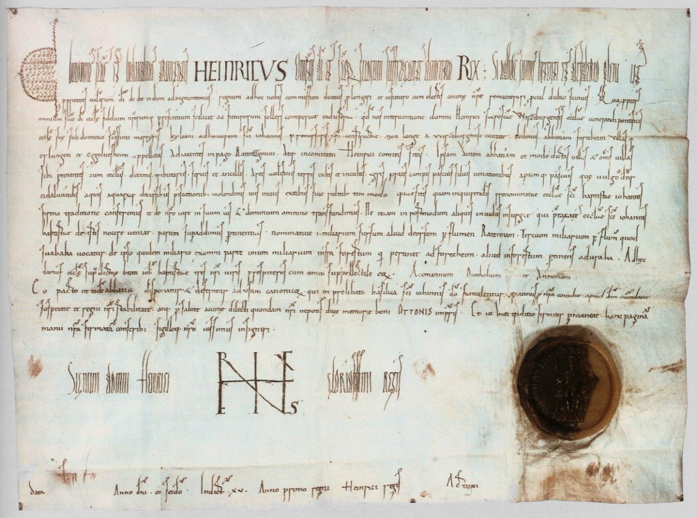 Urkunde des Kaisers Heinrich II. (HRR) aus dem Jahr 1002. Übersetzter Textauszug: Daher sollen alle beflissenen und eifrigen Gläubigen der heiligen Kirche Gottes und unsere Getreuen, und zwar die derzeitigen ebenso wie die künftigen, erfahren, dass wir auf Bitten des Herrn Heinrich, verehrungswürdigen Bischofs der hochheiligen Kirche von Würzburg, seiner Kirche, die unter dem Patronat des hochheiligsten Märtyrers Kilian zu Ehren des Heiligen Johannes, des Vorläufers Christi, errichtet ward in der Nähe der Stadt Würzburg, geschenkt haben die abbatia Forecheim (Kirchgut Forchheim) und die Weiler, die Erlangon (Erlangen) und Eggoluesheim (Eggolsheim) geheißen, die nahebei gelegen sind im Ratintzgouui (Radenzgau) und in der Grafschaft des Grafen Heinrich liegen. In der Urkunde wird an anderer Stelle auch erstmals Uraha (Herzogenaurach) genannt.